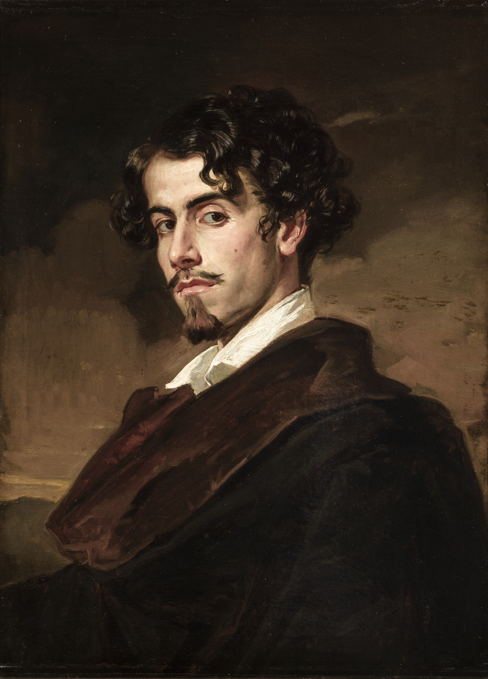 Retrato del poeta romántico español Gustavo Adolfo Bécquer (1836-1870), nacido en Sevilla.